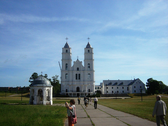 Bazylika w Aglonie